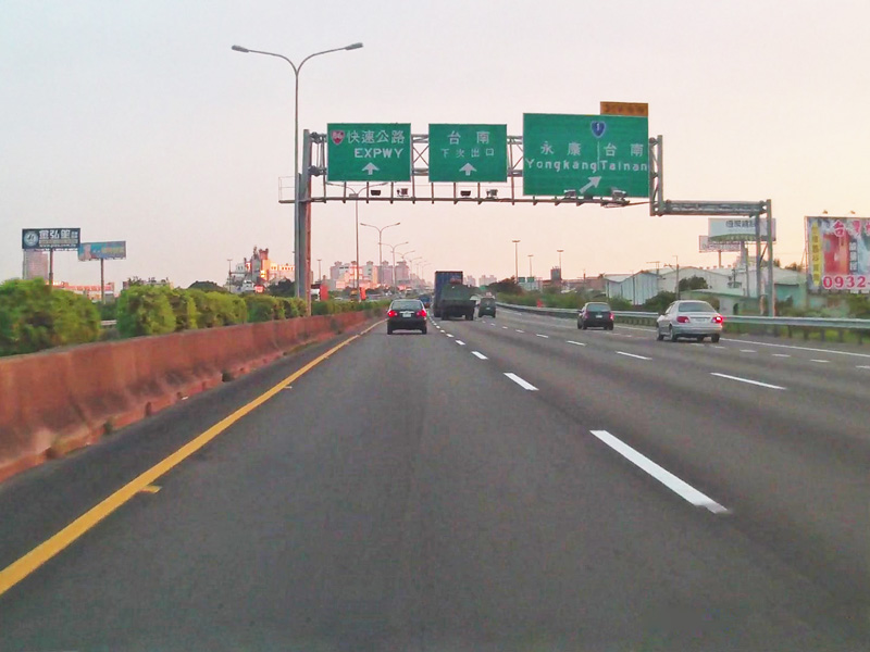 Yongkang IC on No1 National Highway.jpg